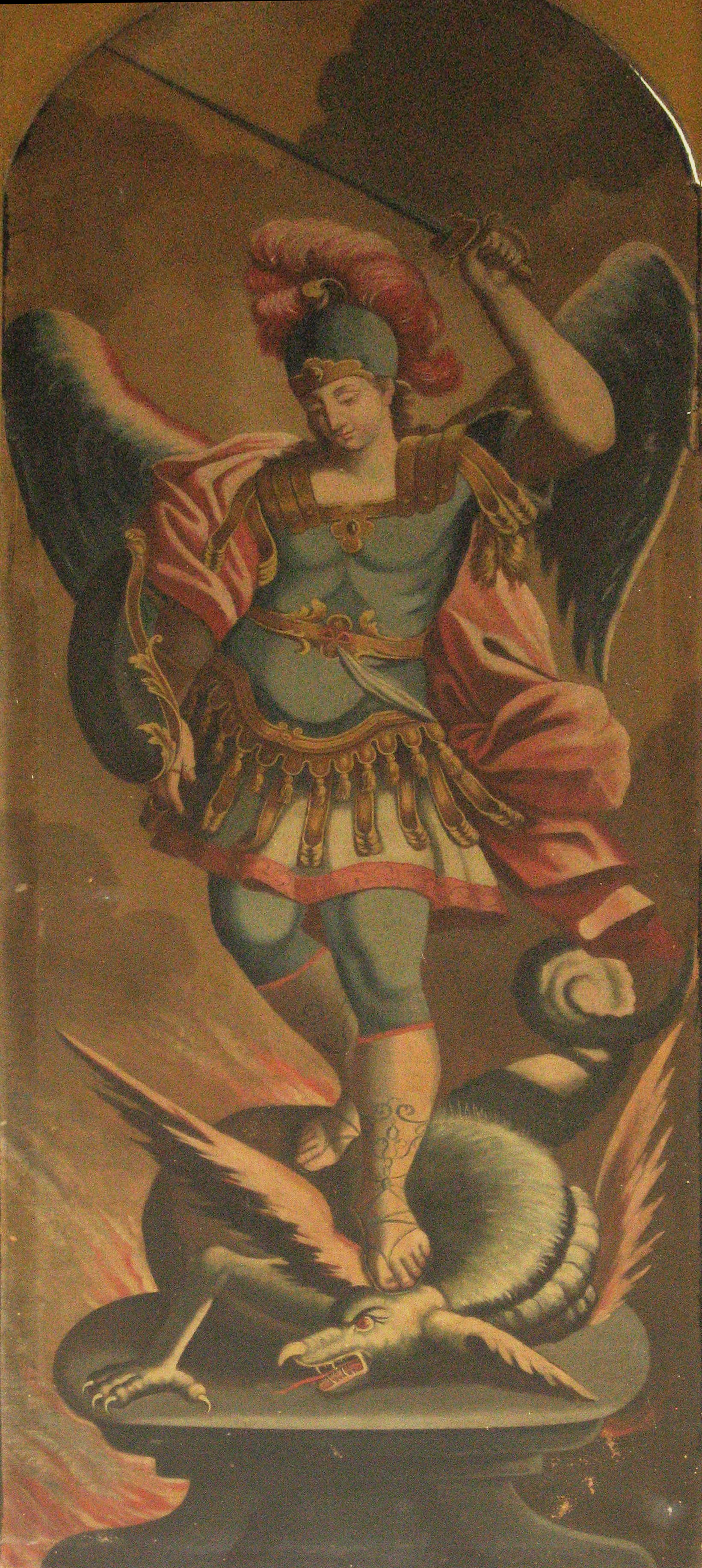 Tela raffigurante San Michele